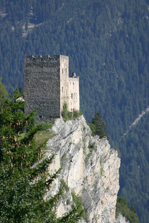 Burg Laudegg in Tirol